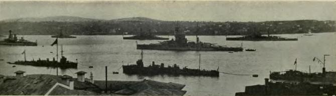 Buques Aliados en Estambul el 22 de febrero de 1920.